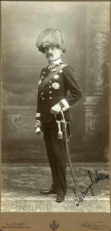 Adalbert Spányik von Dömeháza, Uniformbildnis (ganze Figur stehend, 3/4 links; Generals-hut), eigenhändiger Namenszug; auf der Rückseite eigenhändige Widmung. Quelle: ONB, Inventar-Nr. Pf 26981 : D (1)